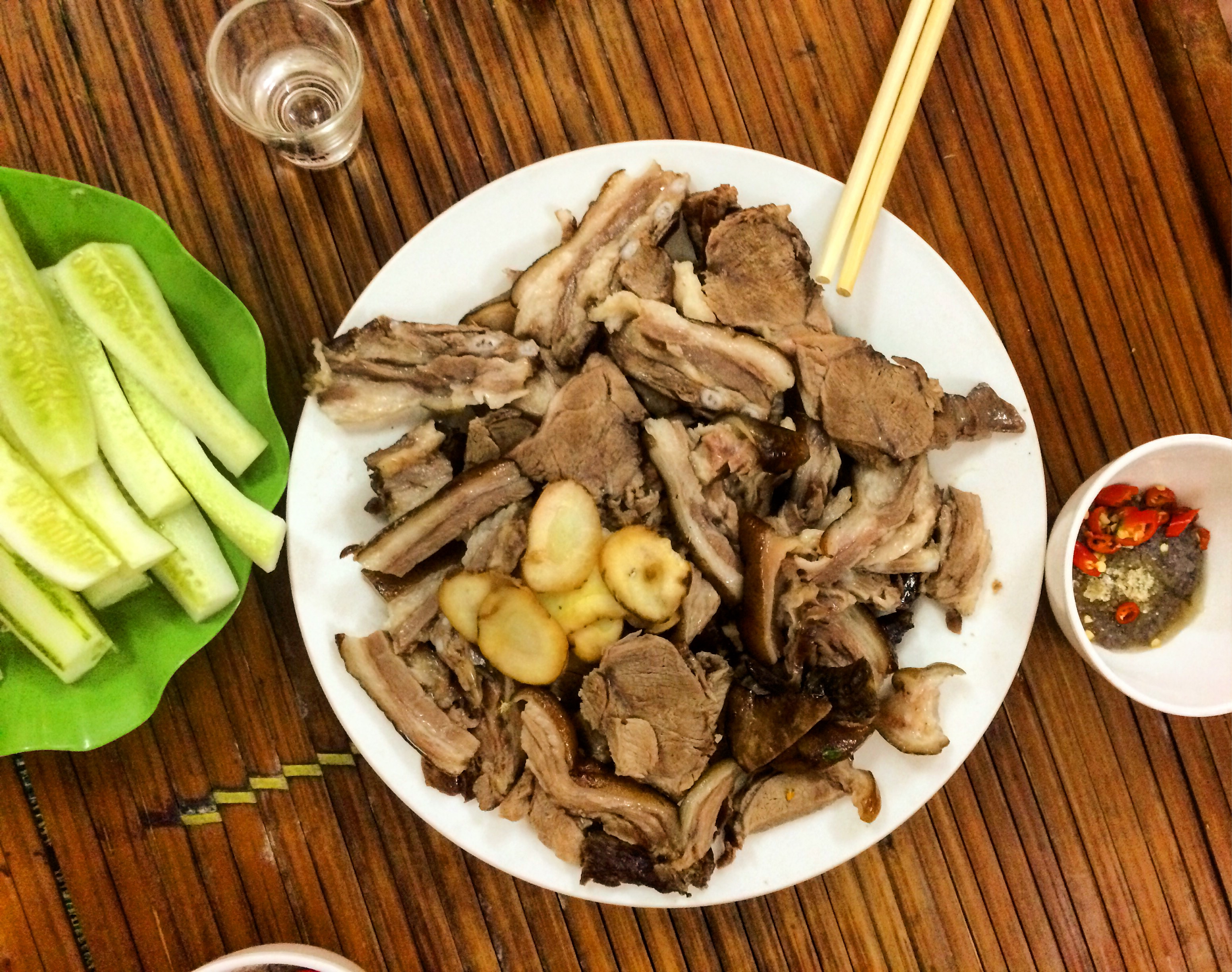 Thịt chó